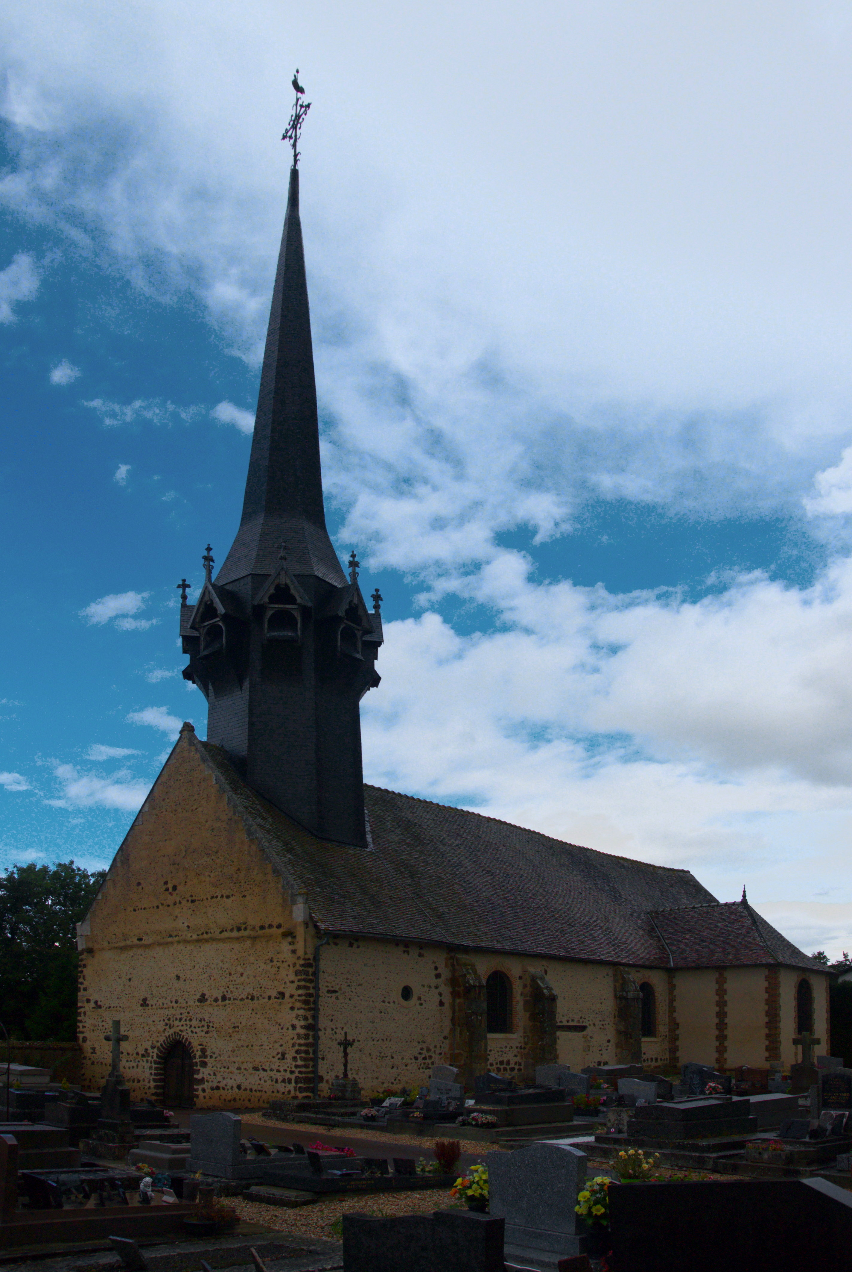 Église Saint-Martin de Cintray .